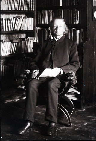 Jens Christian Hostrup (1818-1892), dansk forfatter, dramatiker og præst.